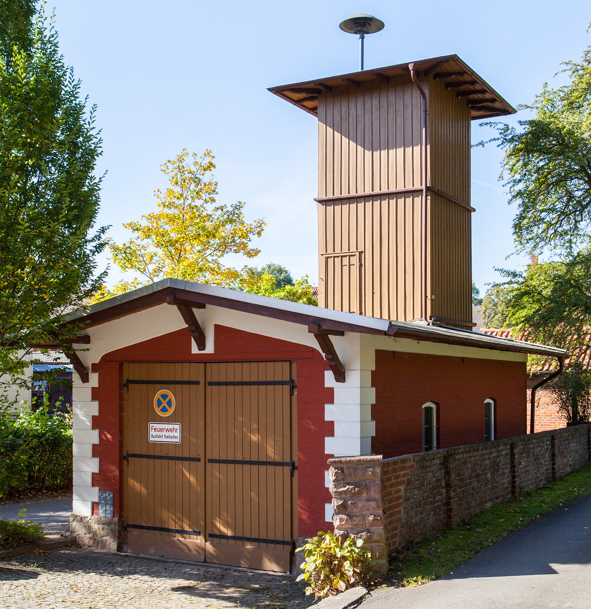 Almena (Extertal), Bachweg 1, FeuerwehrgerätehausThis is a photograph of an architectural monument.